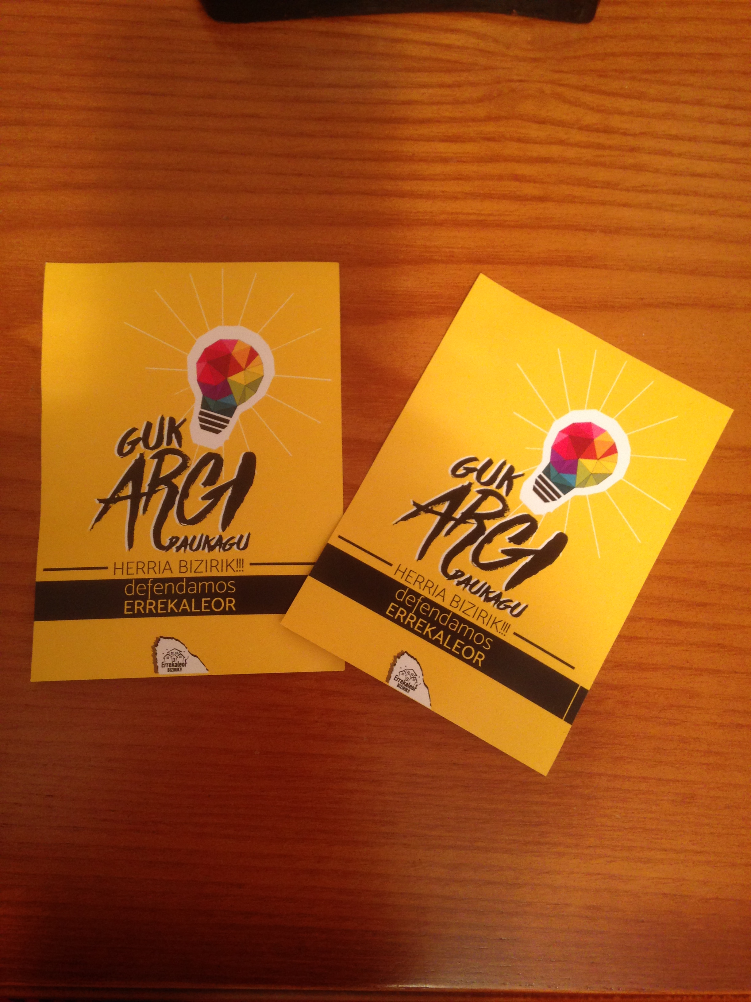 Lema de la manifestación de apoyo al proyecto de autogestión "errekalor bizirik" realizada en Vitoria-Gasteiz (Álava, País Vasco España) el 3 de junio de 2017.